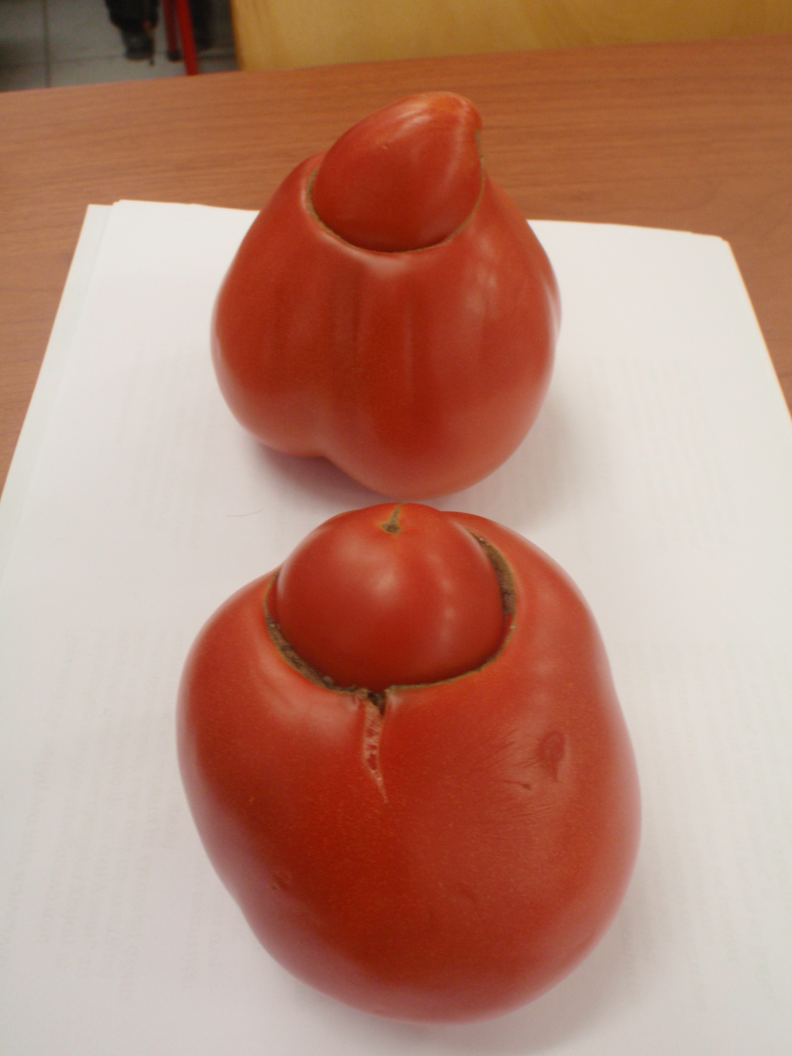 Παραμορφωμένοι καρποί τομάτας